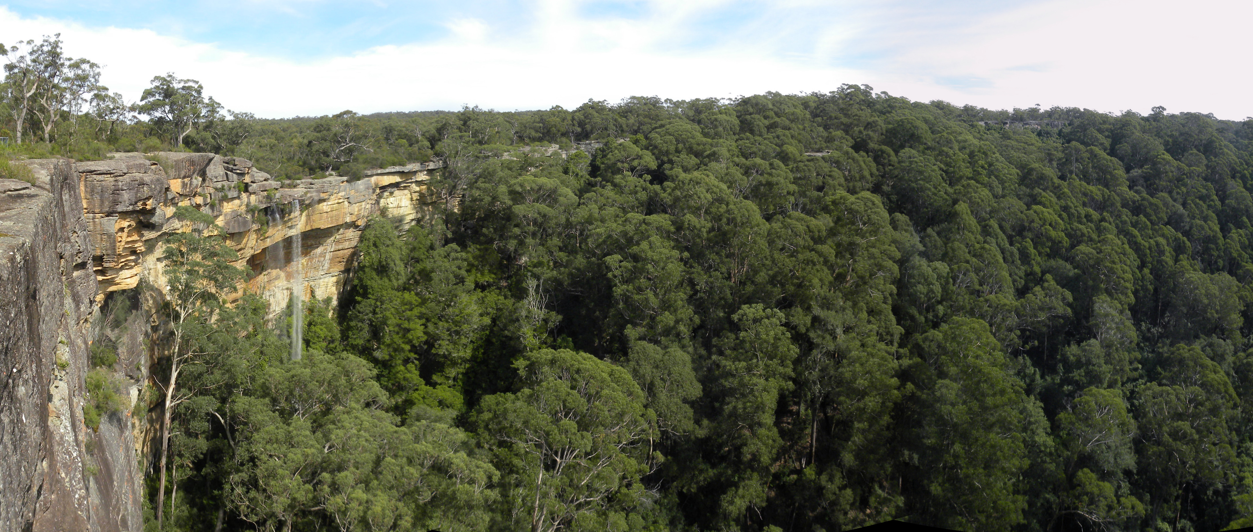 Tianjara